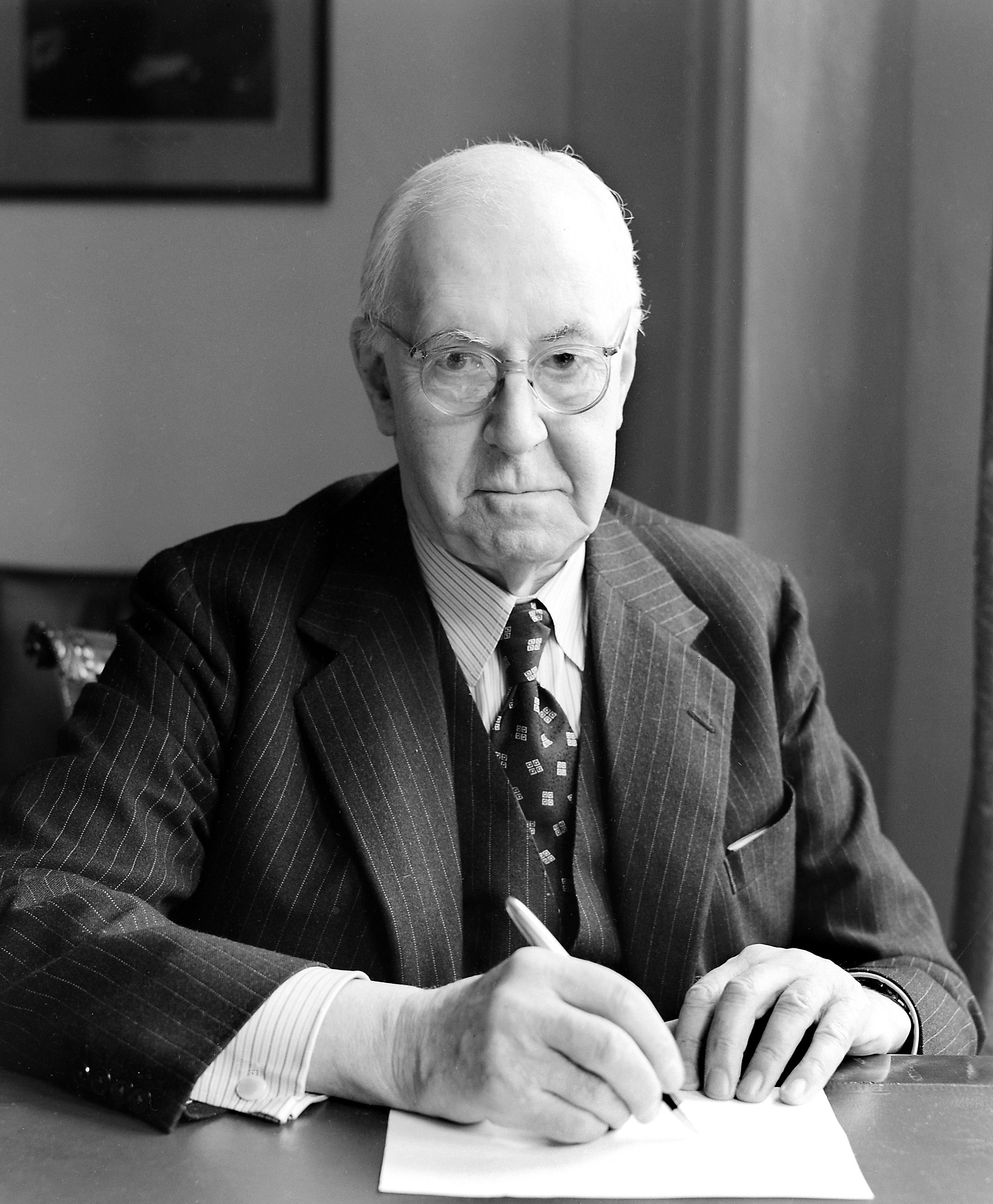 Henry Hallett Dale